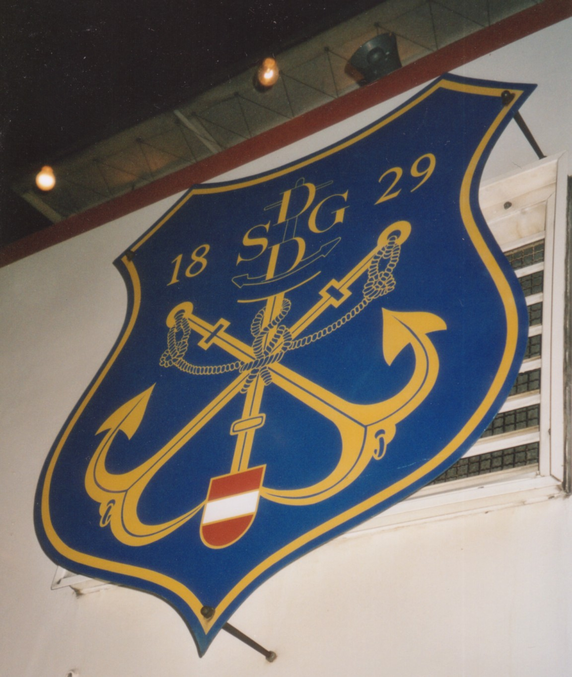 DDSG-Wappen "1829" /jeweils ein Wappen ober dem Einstieg von der MS Admiral Tegetthoff unf MS Prinz Eugen mit dem Gründungsjahr 1829